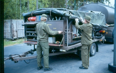 klargöringskärra